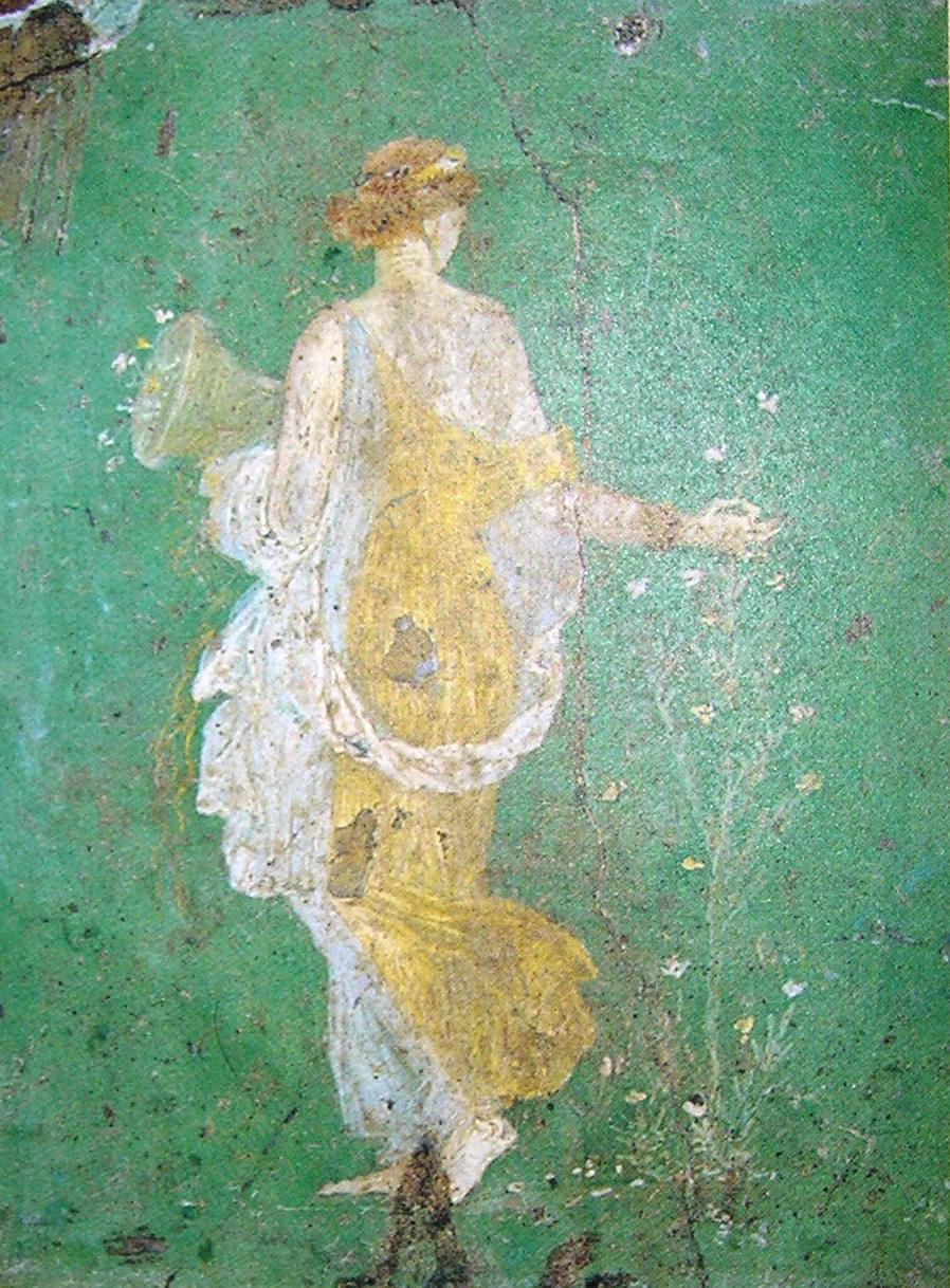 Affresco della Flora o della Primavera, da Stabiae, una delle pitture più famose dell'epoca romana. Rinvenuta a Stabia, si trova oggi al Museo Archeologico Nazionale di Napoli (inv. nr. 8834).